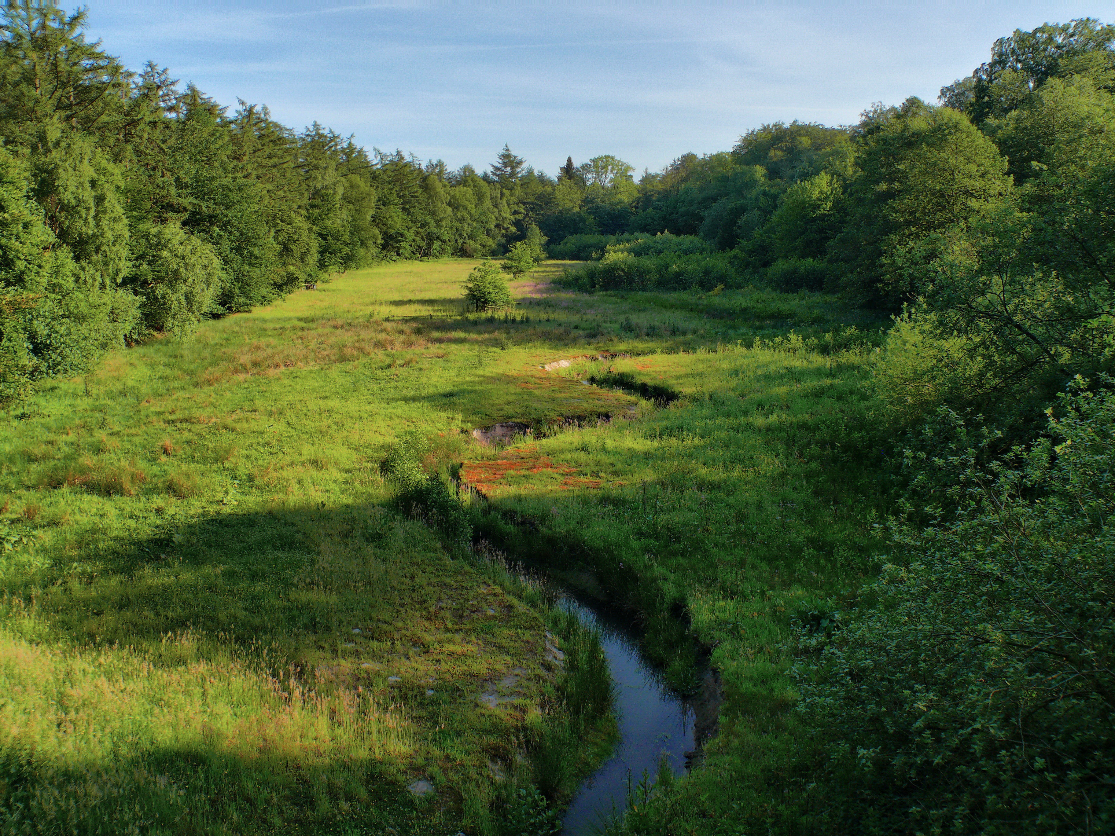 Das Bild wurde von einem Aussichtsturm im Naturschutzgebiet Hasbruch (WE 063) aufgenommen, der aus heimischem Douglasienholz gefertigt wurde. Zu sehen ist die Renaturierungsfläche 'Jagdhüttenwiese', auf der ein künstlicher Seitenarm der Brookbäke angelegt wurde, um diese mit einem natürlich-kurvenreichen Verlauf zu revitalisieren.